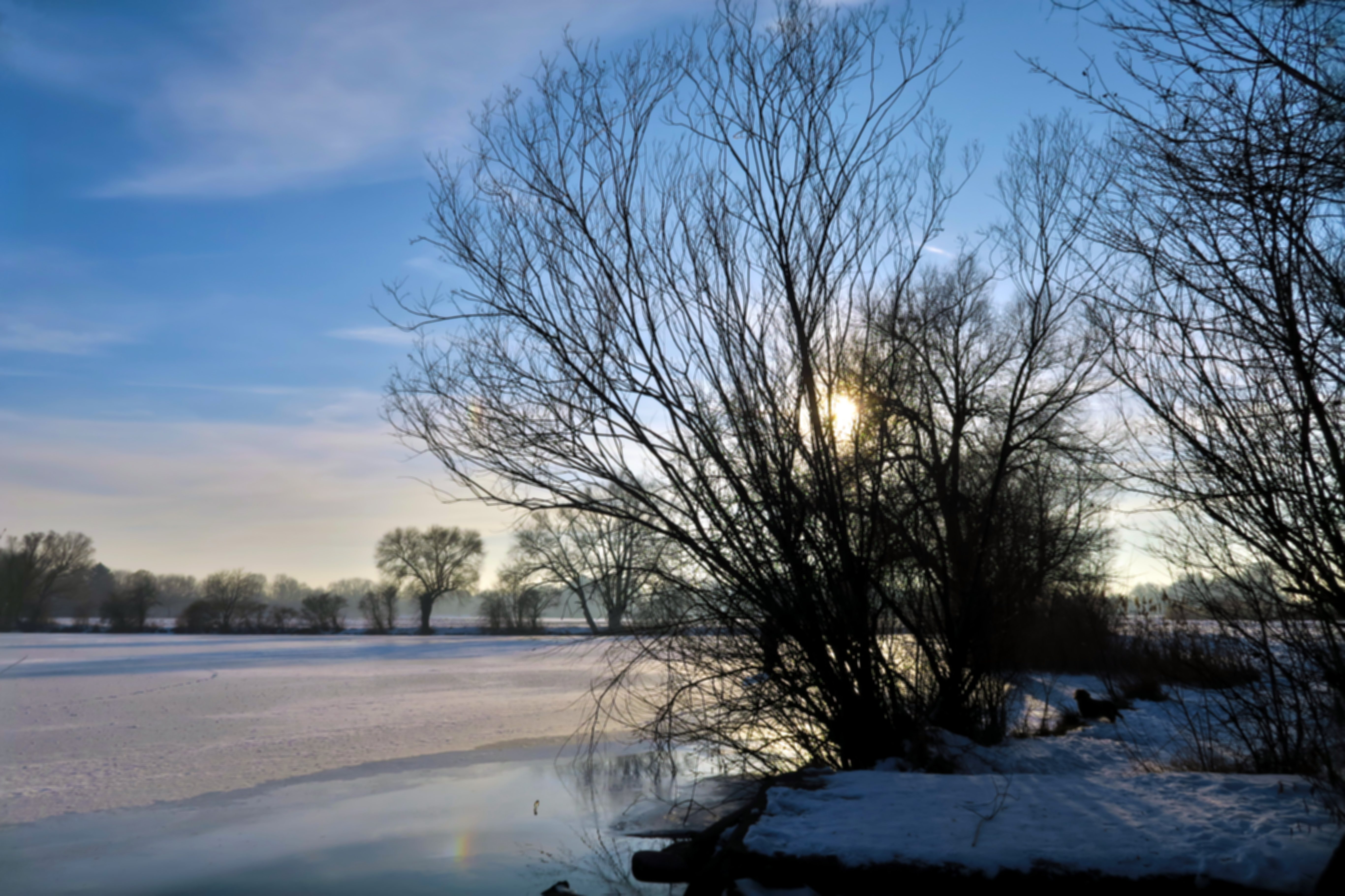 Deutschland, Bayern, Oberbayern, Landkreis Fürstenfeldbruck, Olching, "Kleiner Olchinger See" bzw. "Gröbenzeller See", Auslauf in Richtung Olching